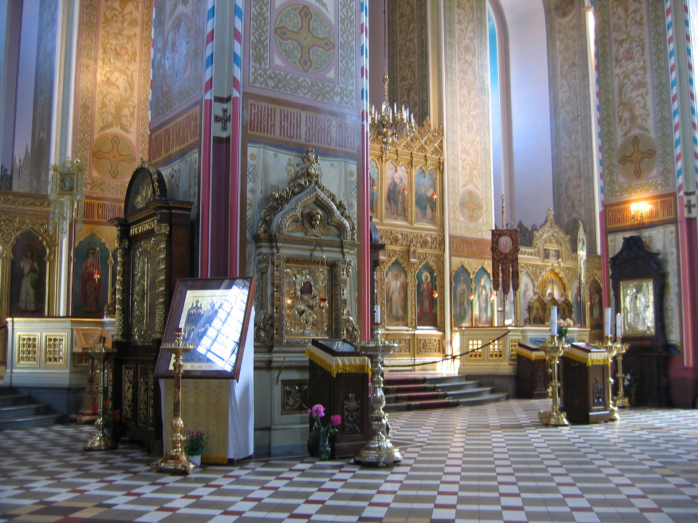 Tallinn, Stadtzentrum